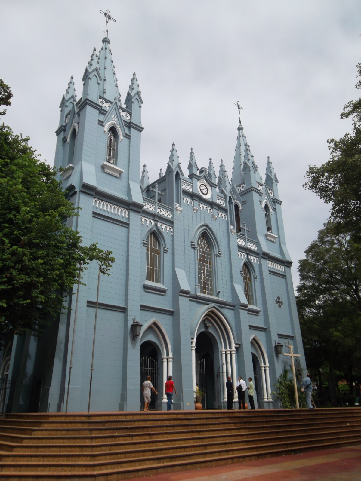 Fachada frontal y escalinata Catedral de San Lorenzo